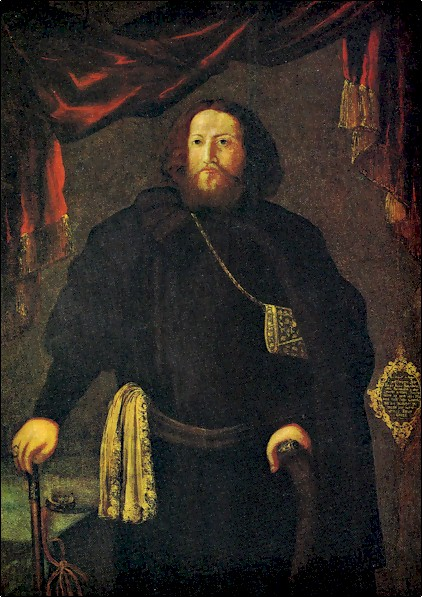 Боярин Борис Иванович Прозоровский. Худ. Грубе Э. 1694.